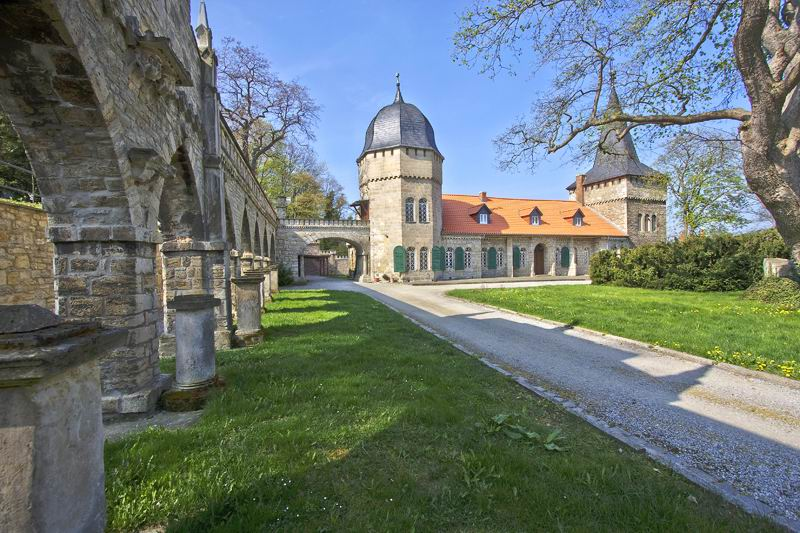 Chateau de Röderhof